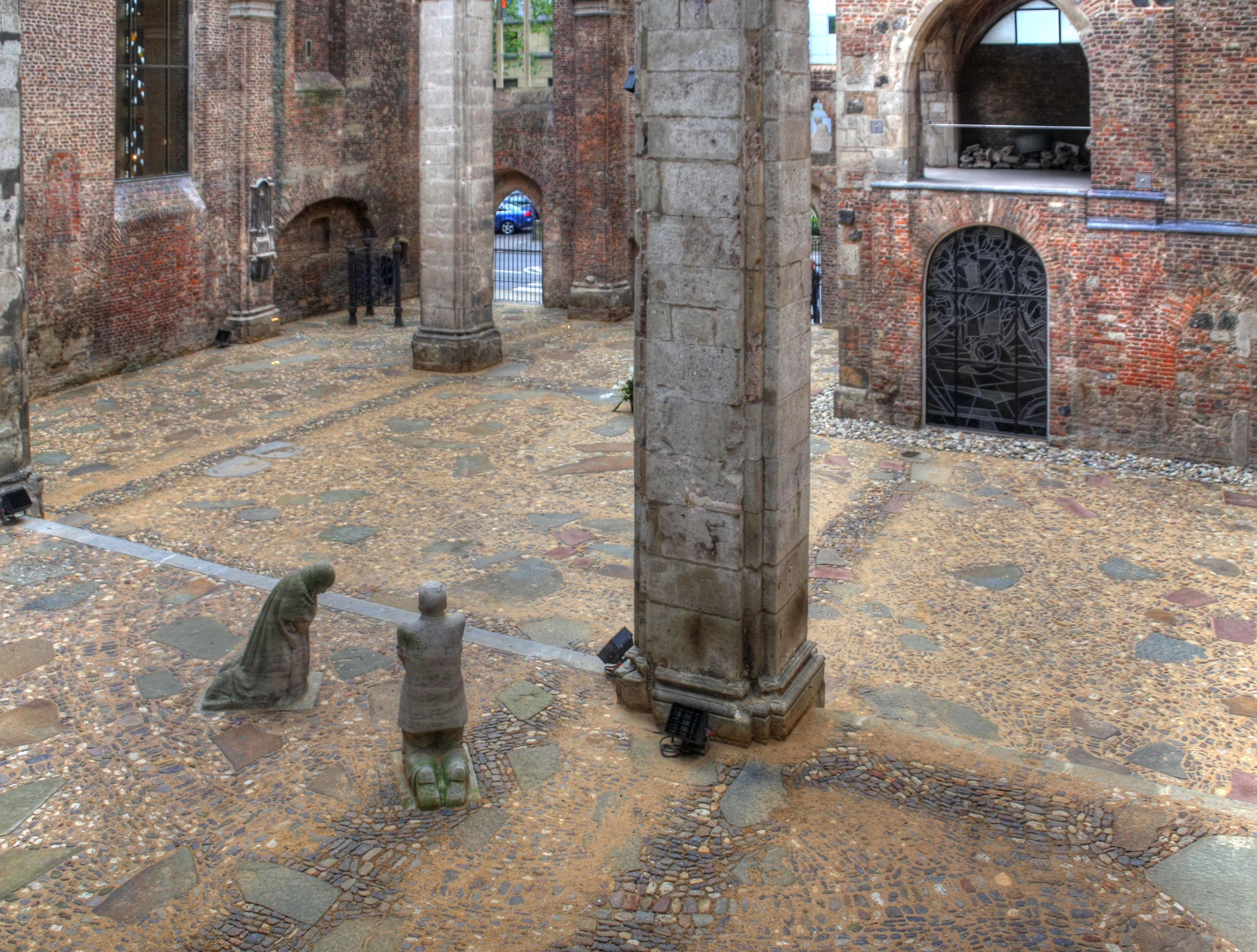 Innenhof von Alt St. Alban, gesehen aus einem Fenster im Obergeschoss des Gürzenich